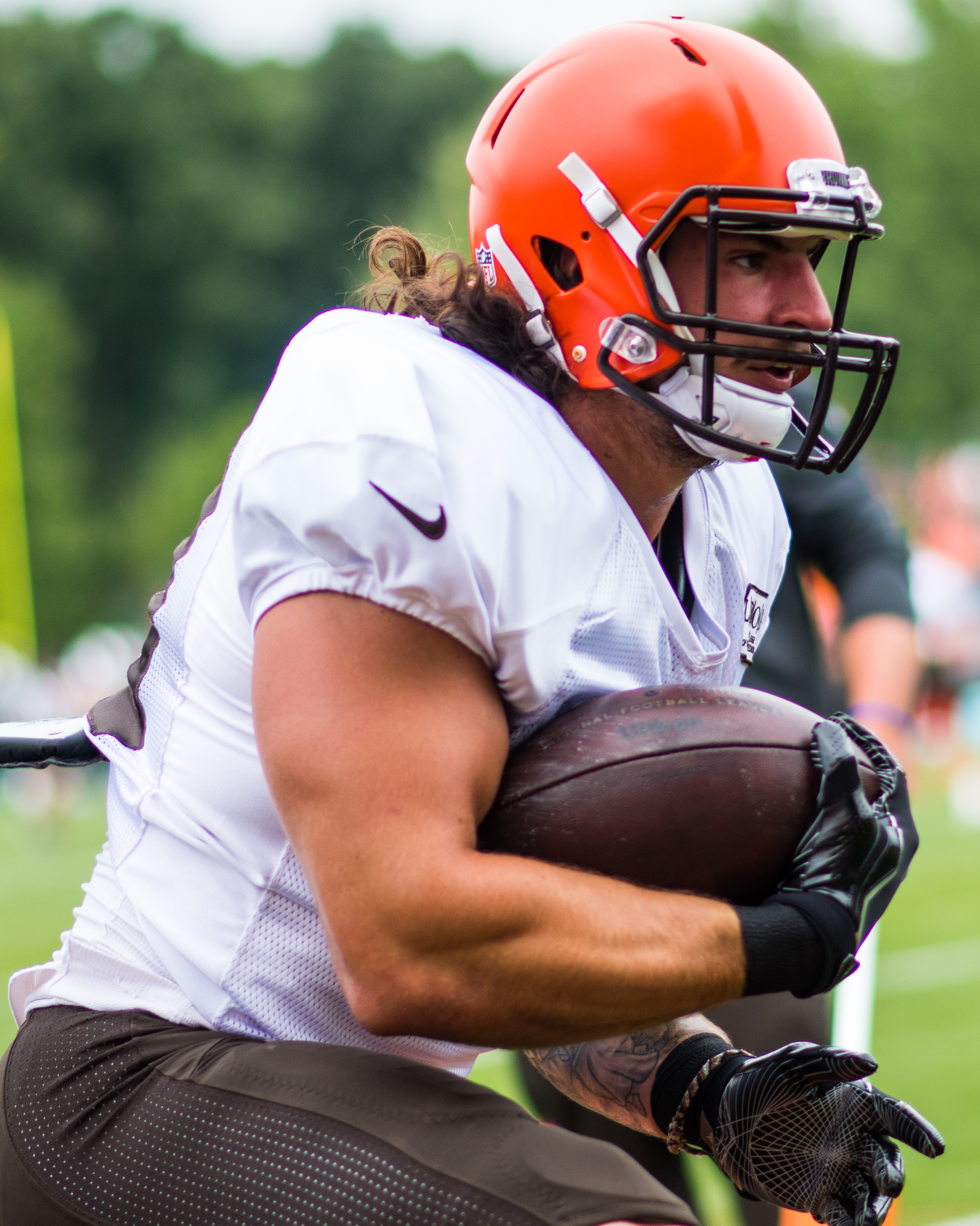 Danny Vitale